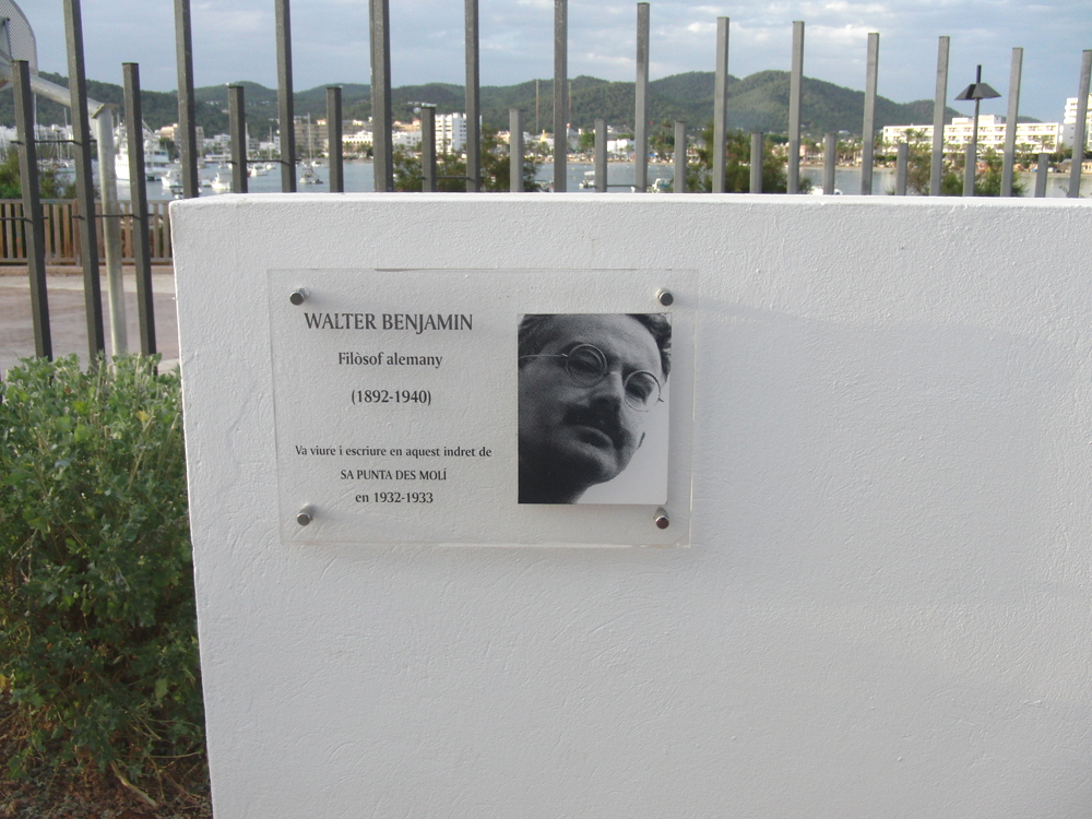 'Sa Punta des Moli', Gedenktafel zu Ehren Walter Benjamins, der in diesem Haus während seiner Ibiza-Aufenthalte lebte.